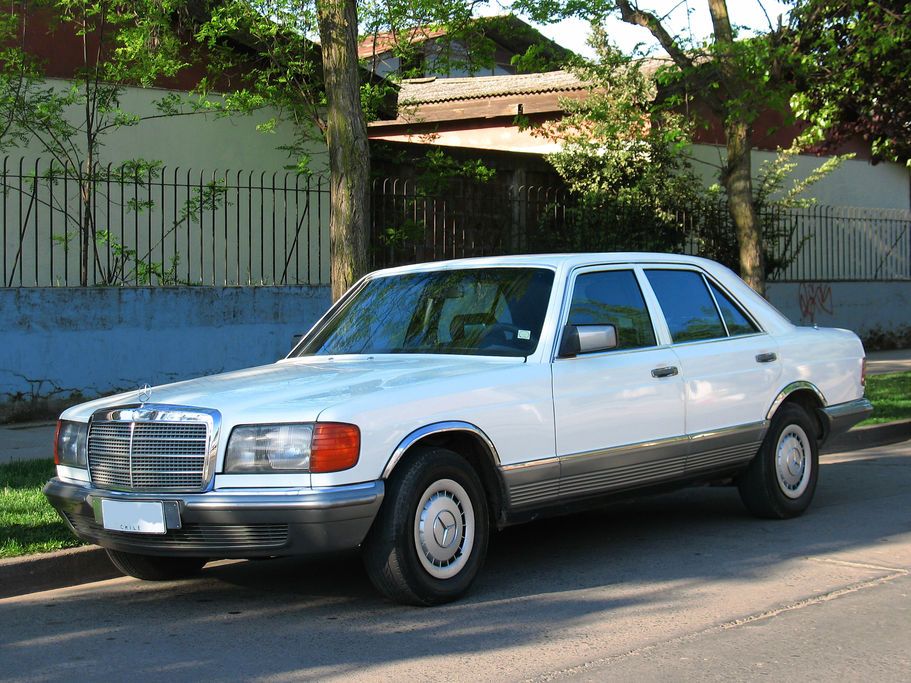 Mercedes Benz 280 S 1981